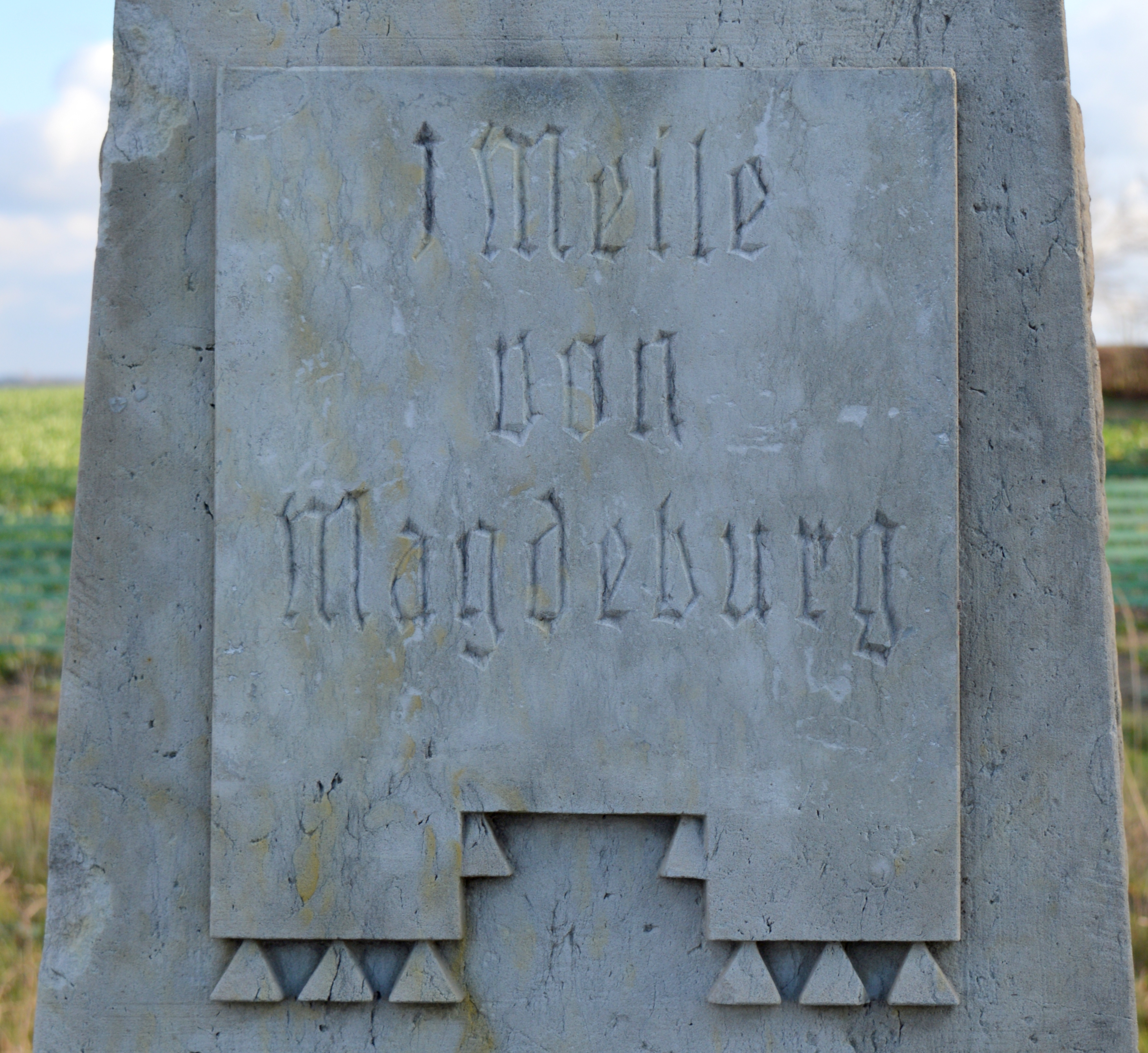 Inschrift auf der Westseite des Meilensteins im Beyendorfer Grund